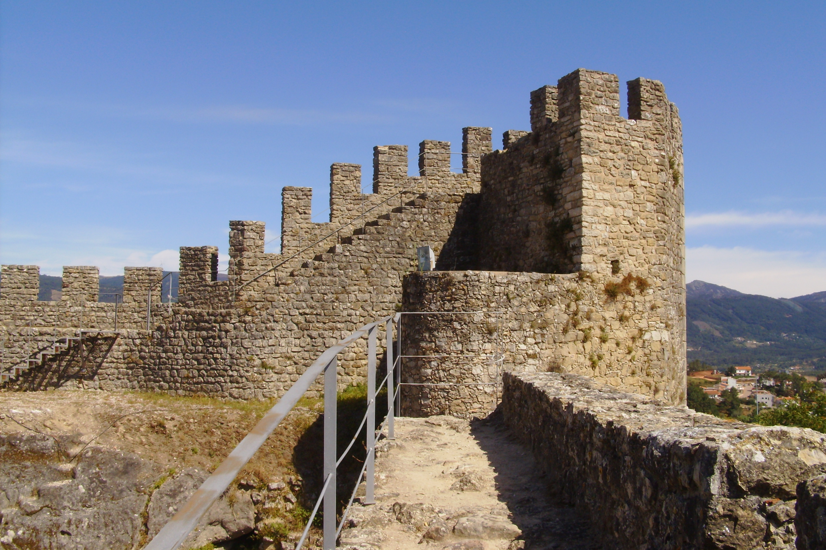 Castelo de Penela, freguesia de Santa Eufémia, concelho de Penela, distrito de Coimbra, Portugal: detalhe da torre que ampara a "Brecha das Desaparecidas".